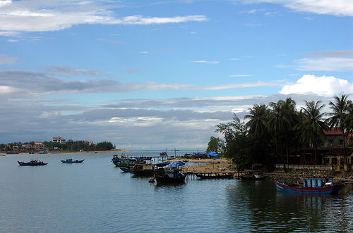 Nhat Le River, Quang Binh, Vietnam